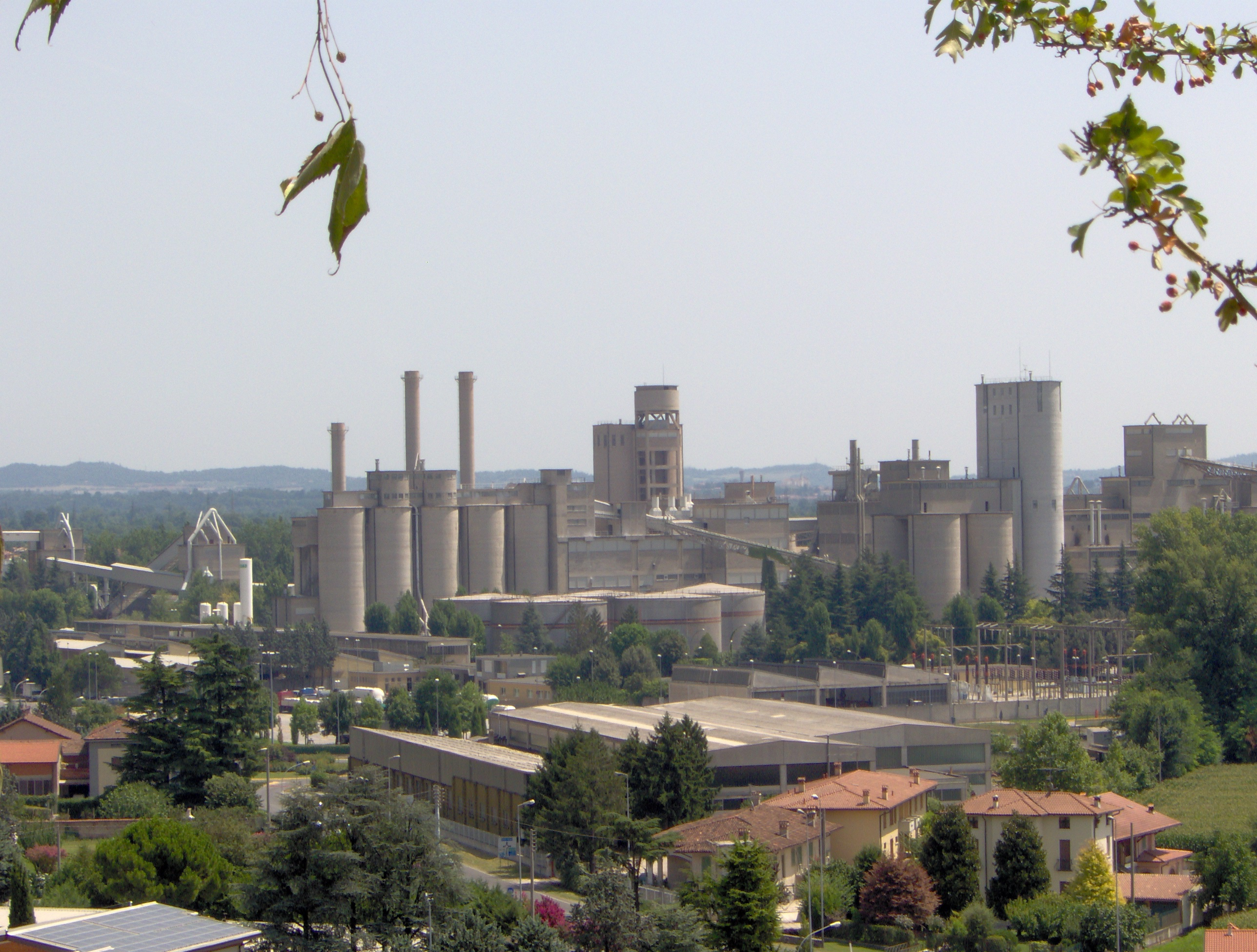 Veduta dello stabilimento della Italcementi presso Rezzato